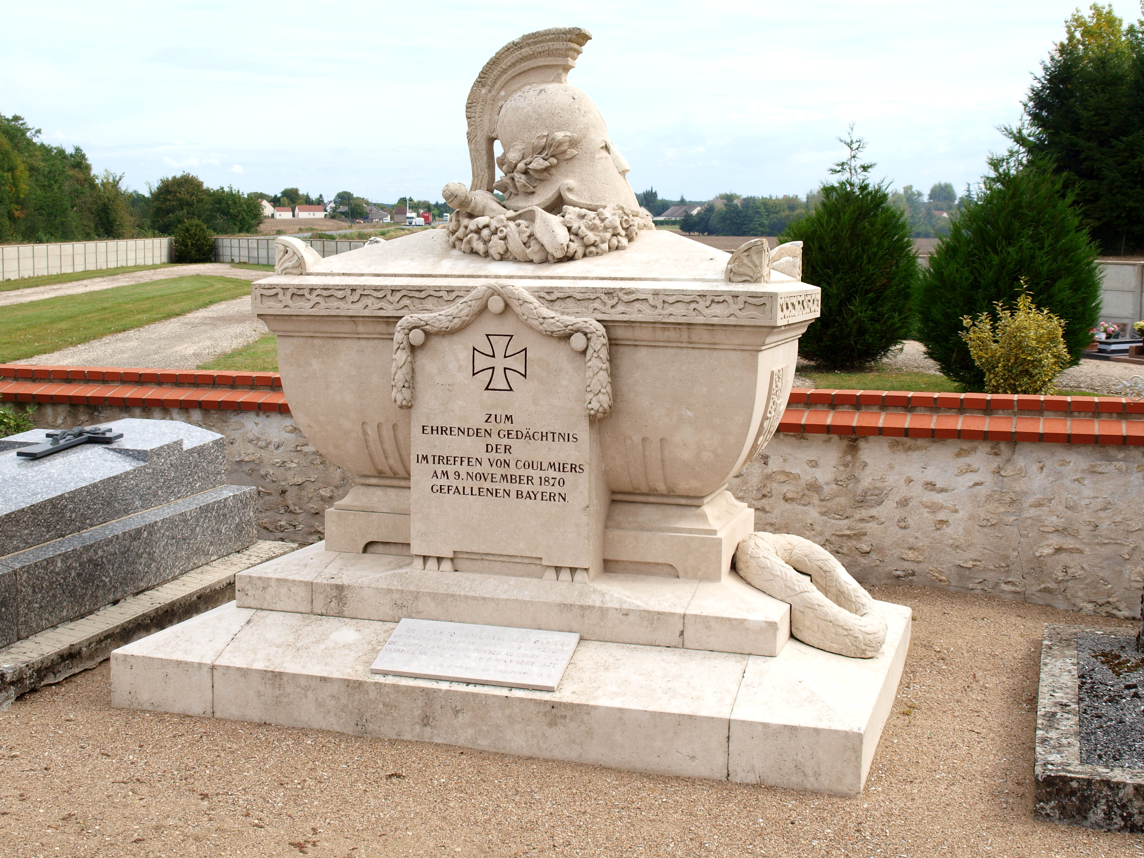 Coulmiers (Loiret, France) ; mémorial bavarois de la bataille de Coulmiers le 9 novembre 1870.